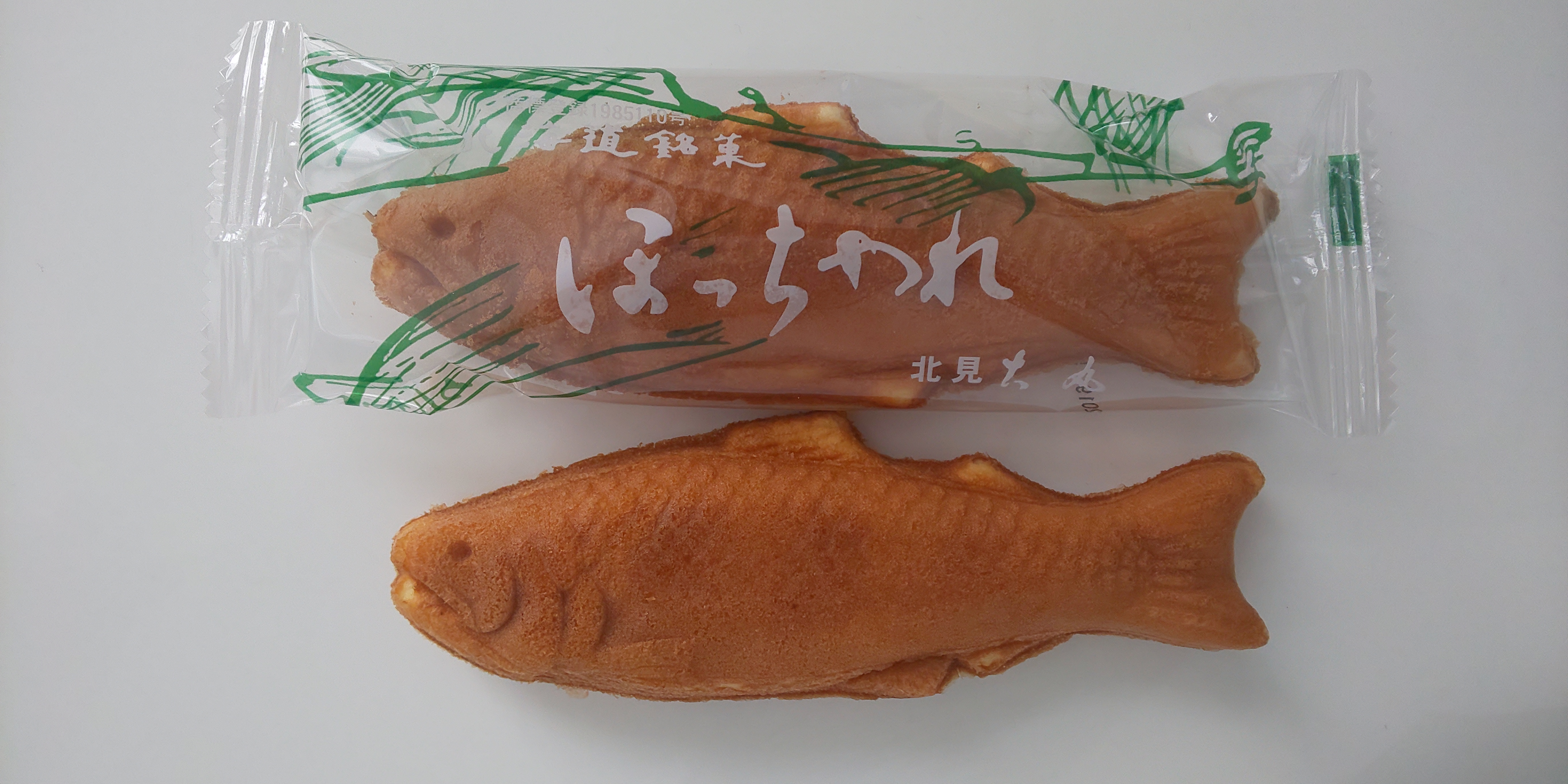 ほっちゃれの個包装とその中身